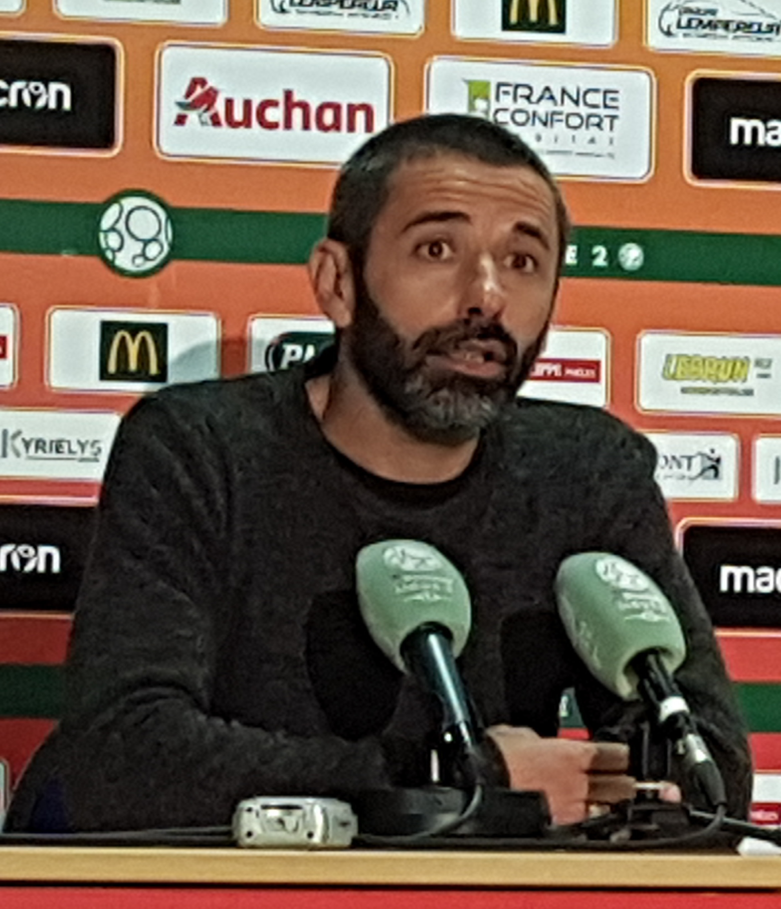 Nicolas Usaï après le match RC Lens / LB Châteauroux, le 3 novembre 2018, comportant pour la treizième journée du championnat de France de football de Ligue 2, au Stade Bollaert-Delelis.